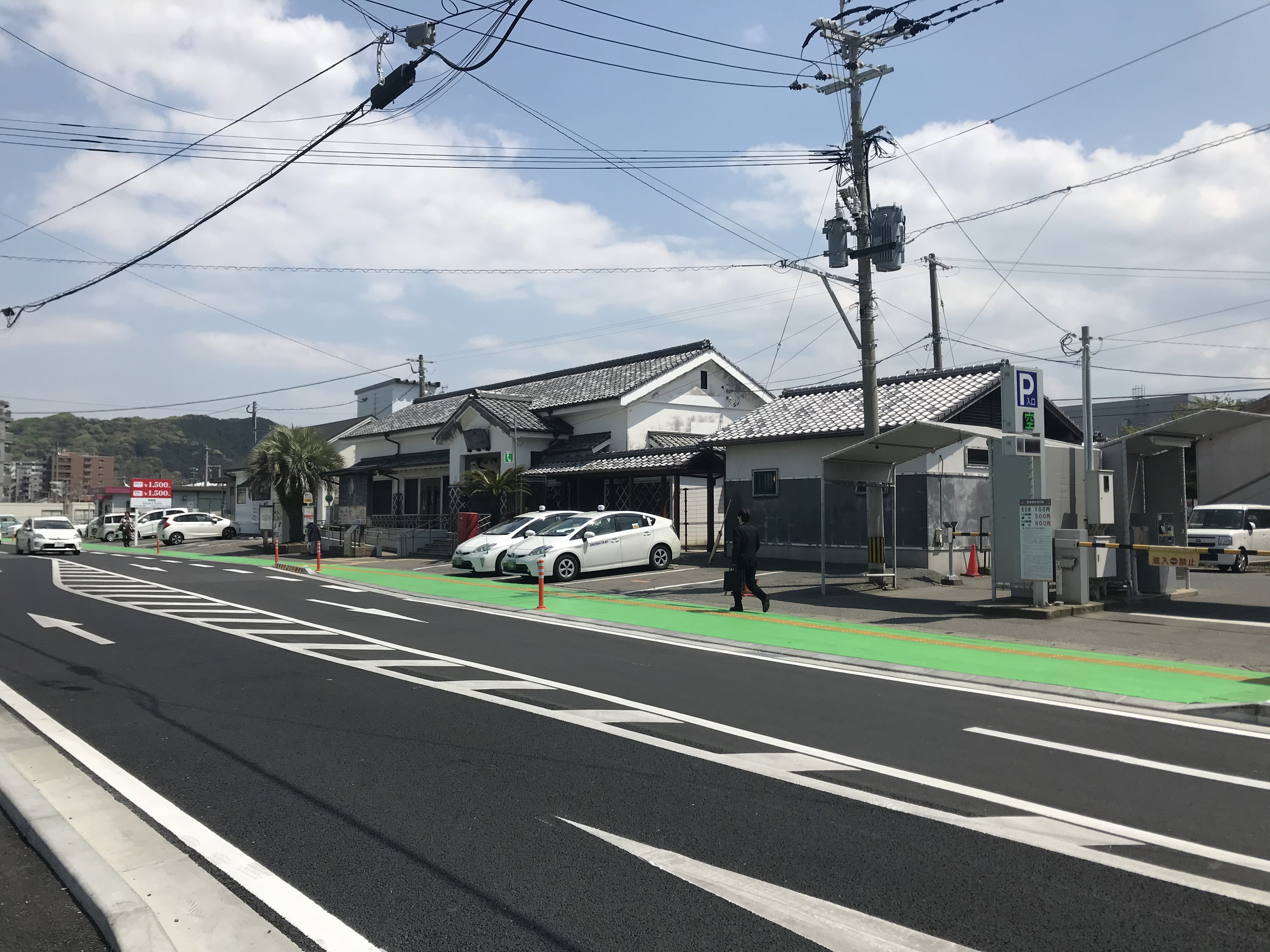 今宿駅の遠景